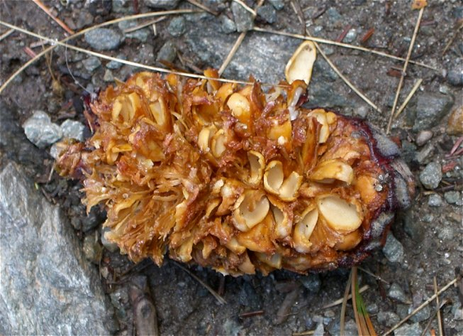 Zapfen der Zirbelkiefer (Pinus cembra), vom Tannenhäher (Nucifraga caryocatactes) bearbeitet, Alpen, Wallis